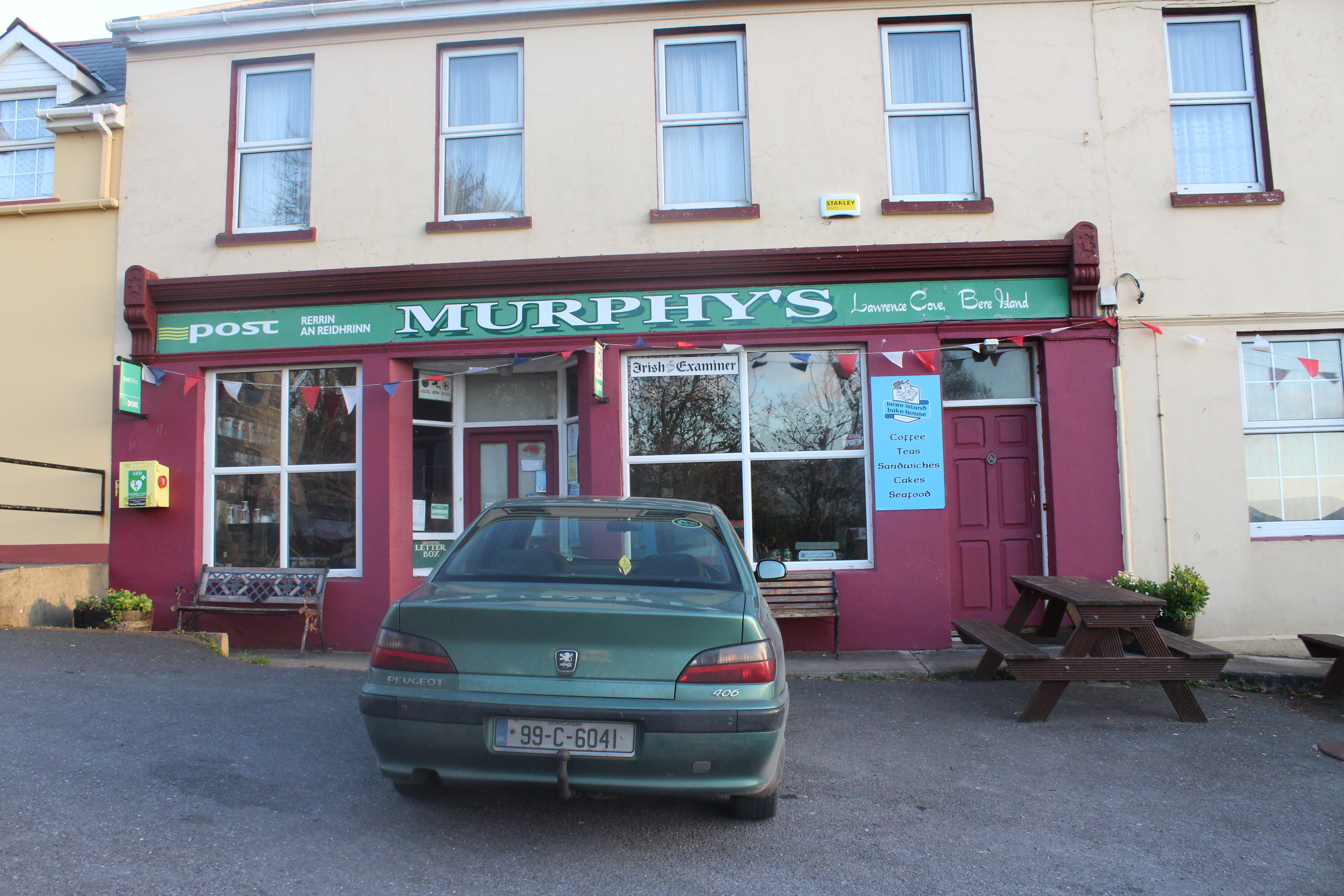 Postkantoor van Bere eiland